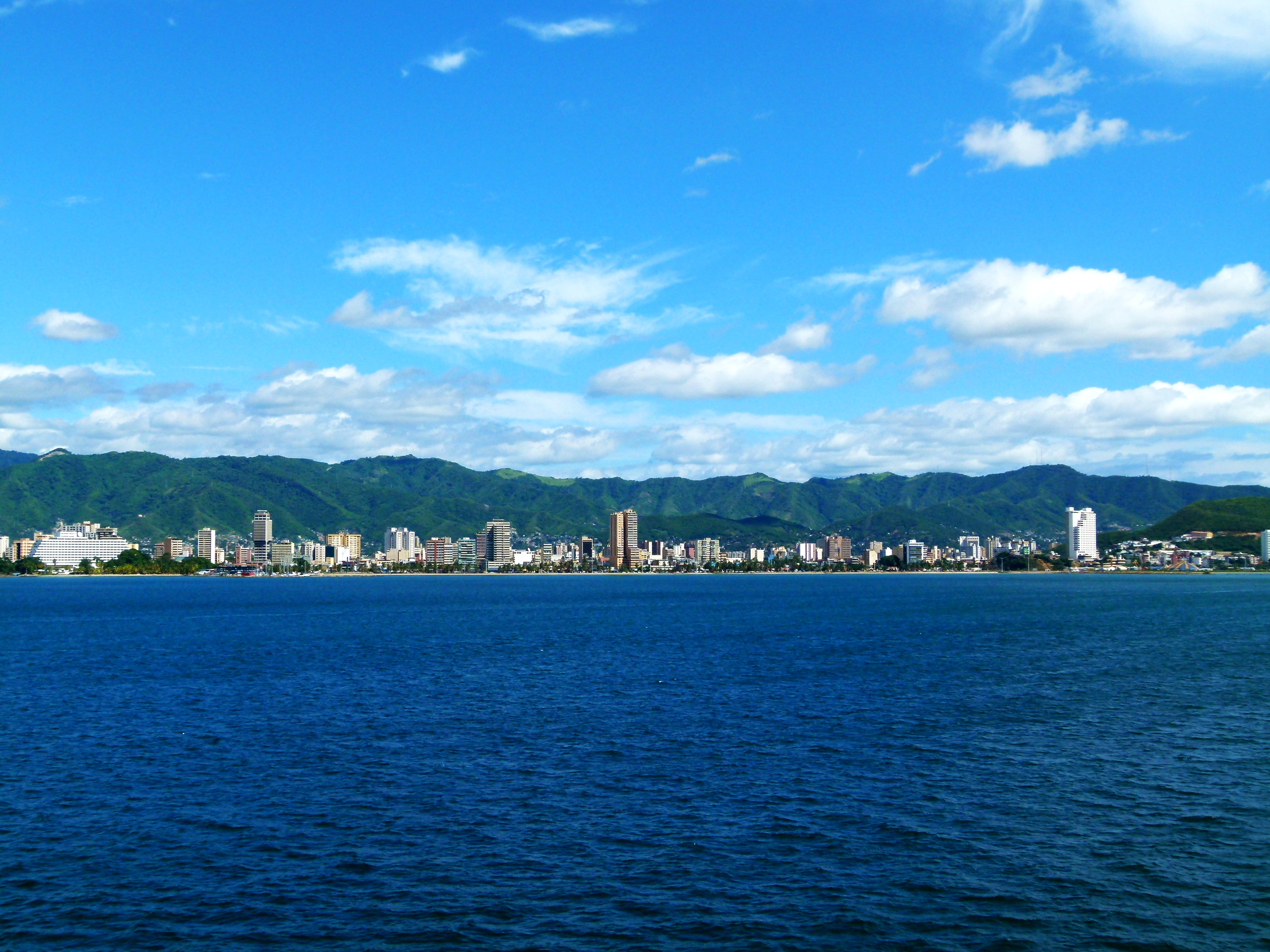 Puerto La Cruz